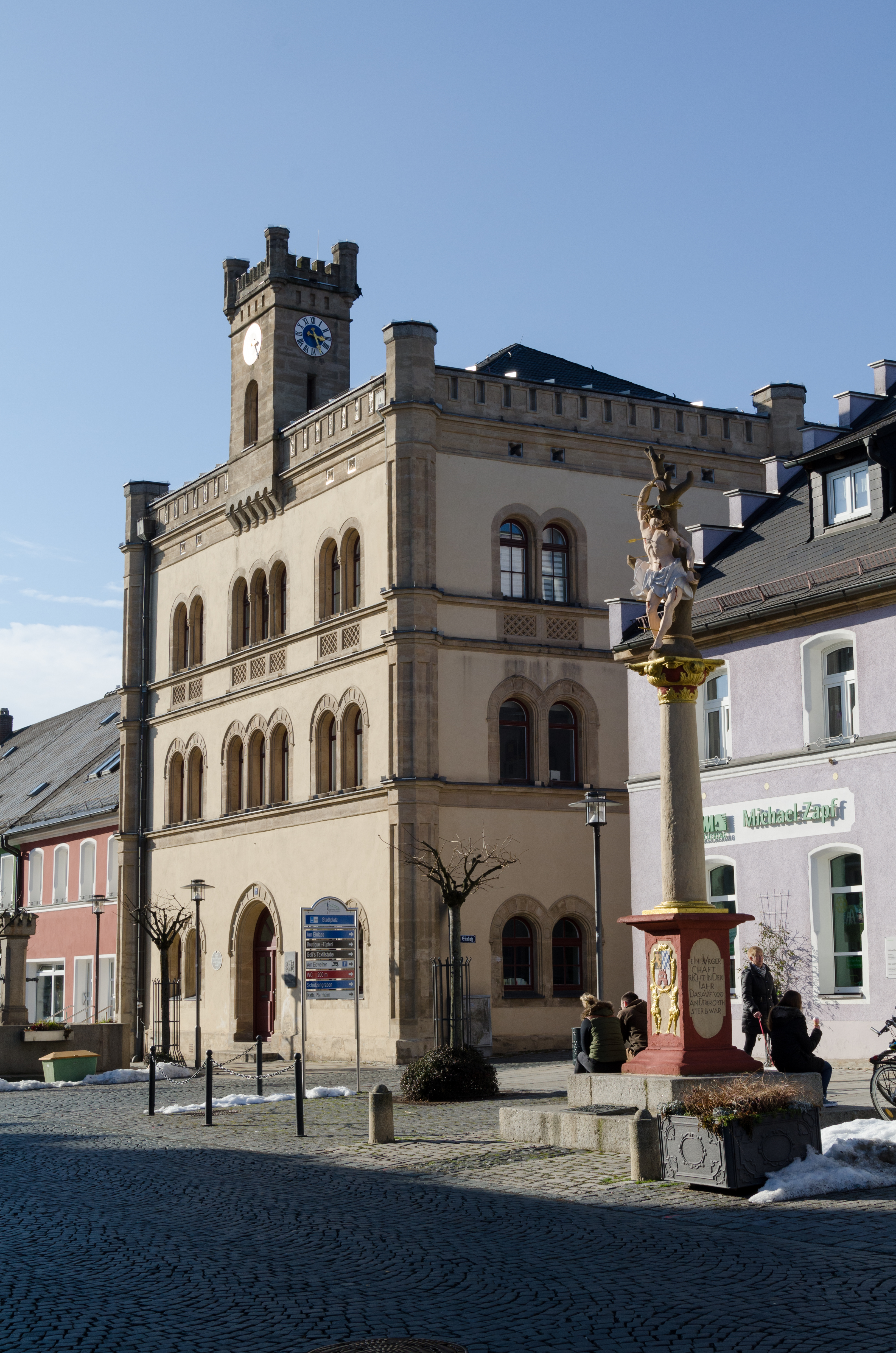 Kemnath, Stadtplatz 27